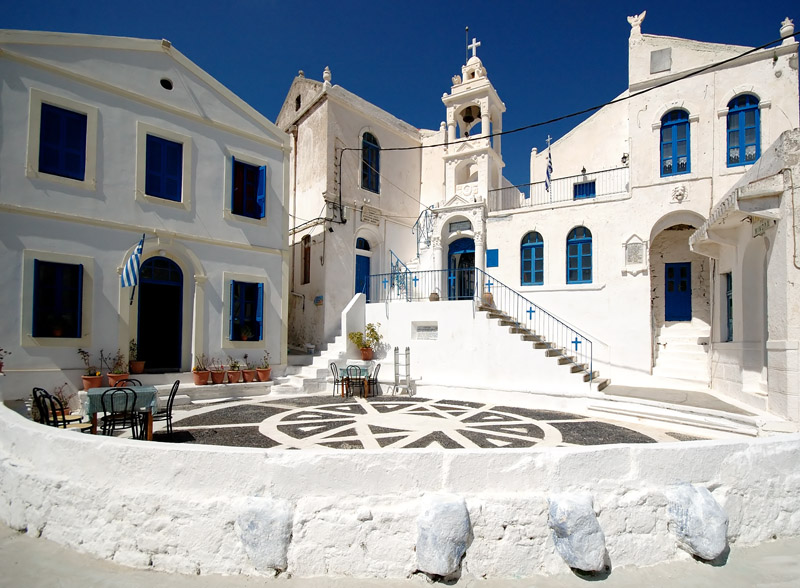 île de Nissiros